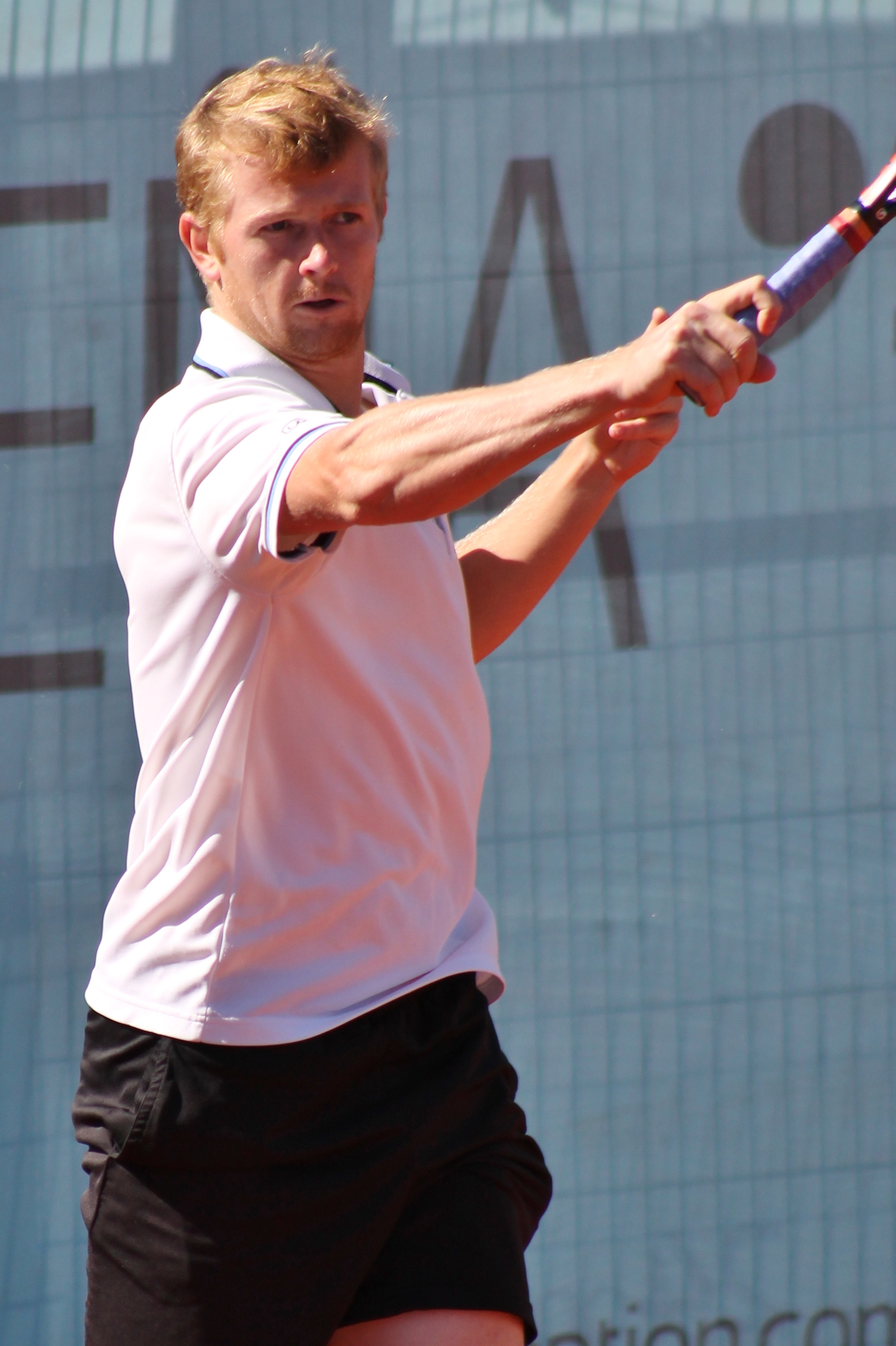 Golubev MA14 (4)